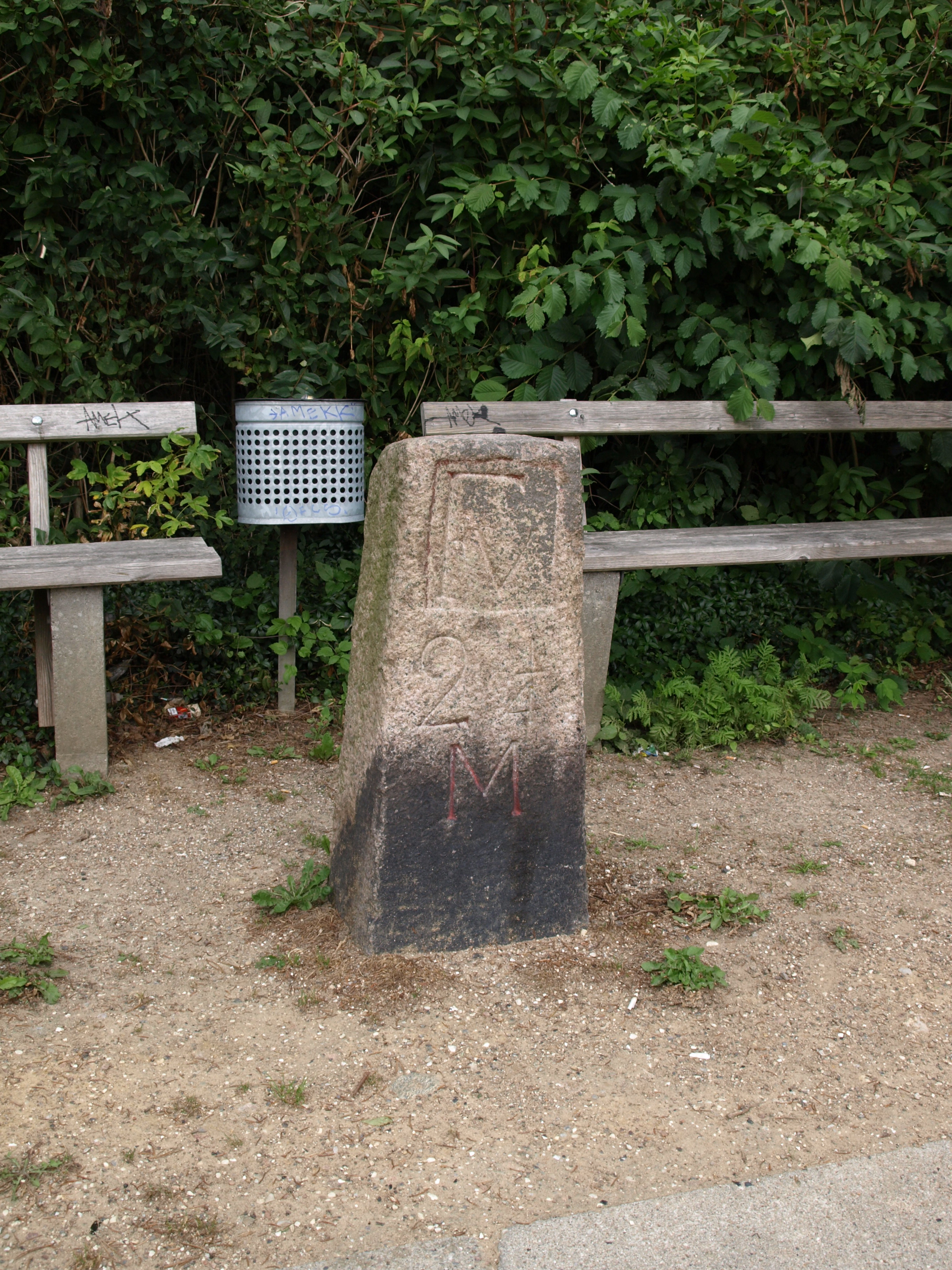 Milepæl af granit på Rudersdal Bakke ved 16,2 km. Indskriften lyder: FV 2 1/4 M. Af typen S.C.